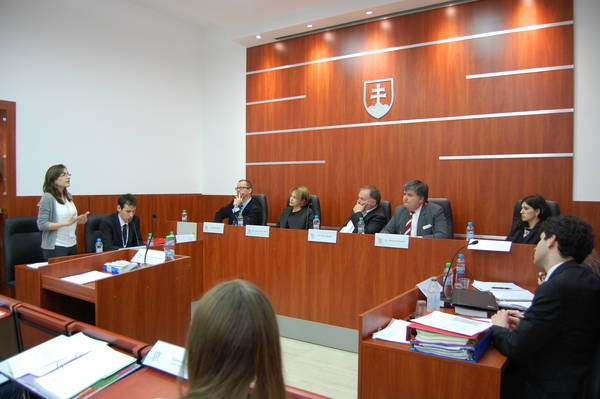 Súdna sieň Právnickej fakulty Univerzity Komenského v Bratislave